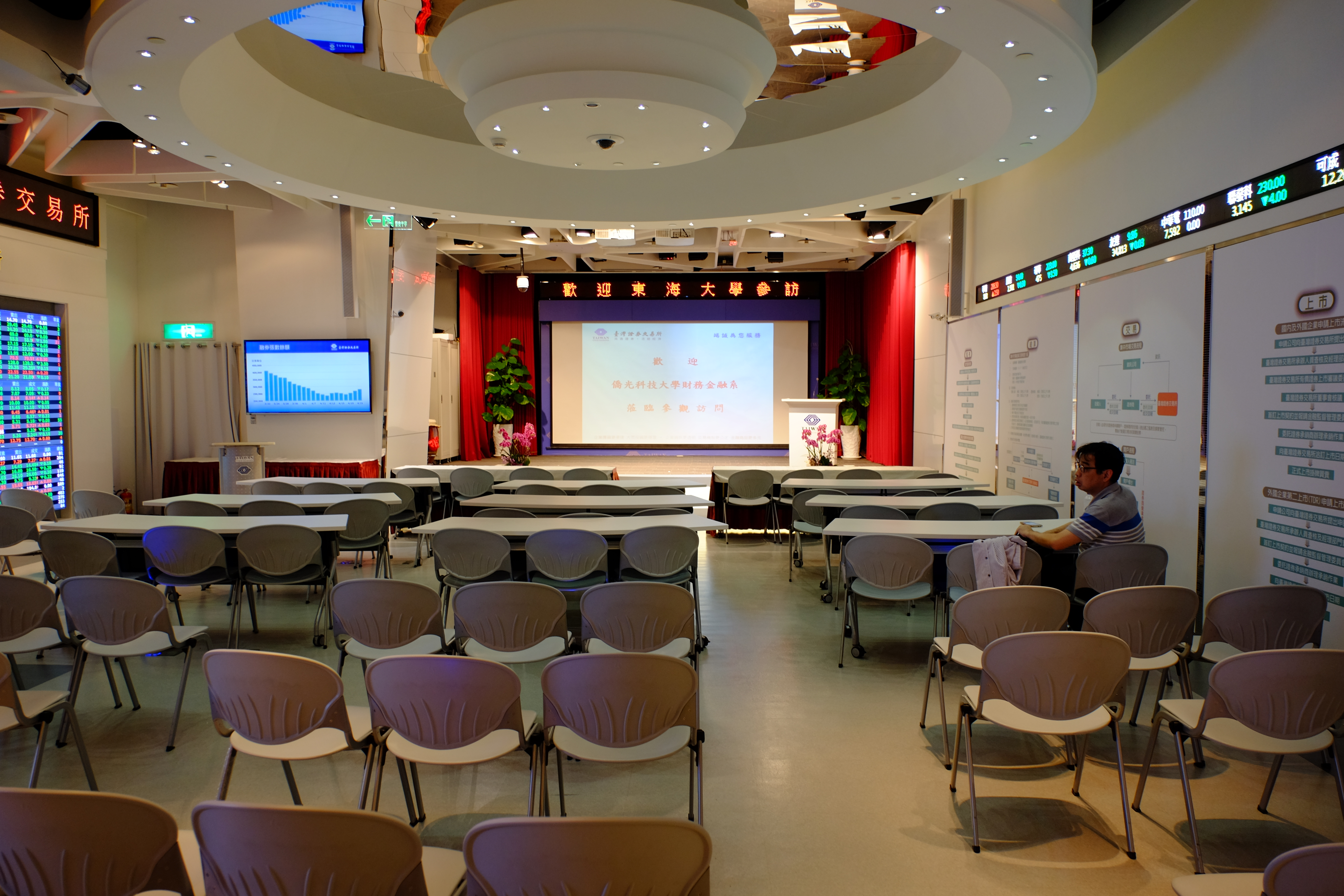 臺北101大樓一樓臺灣證券交易所簡報室室內。